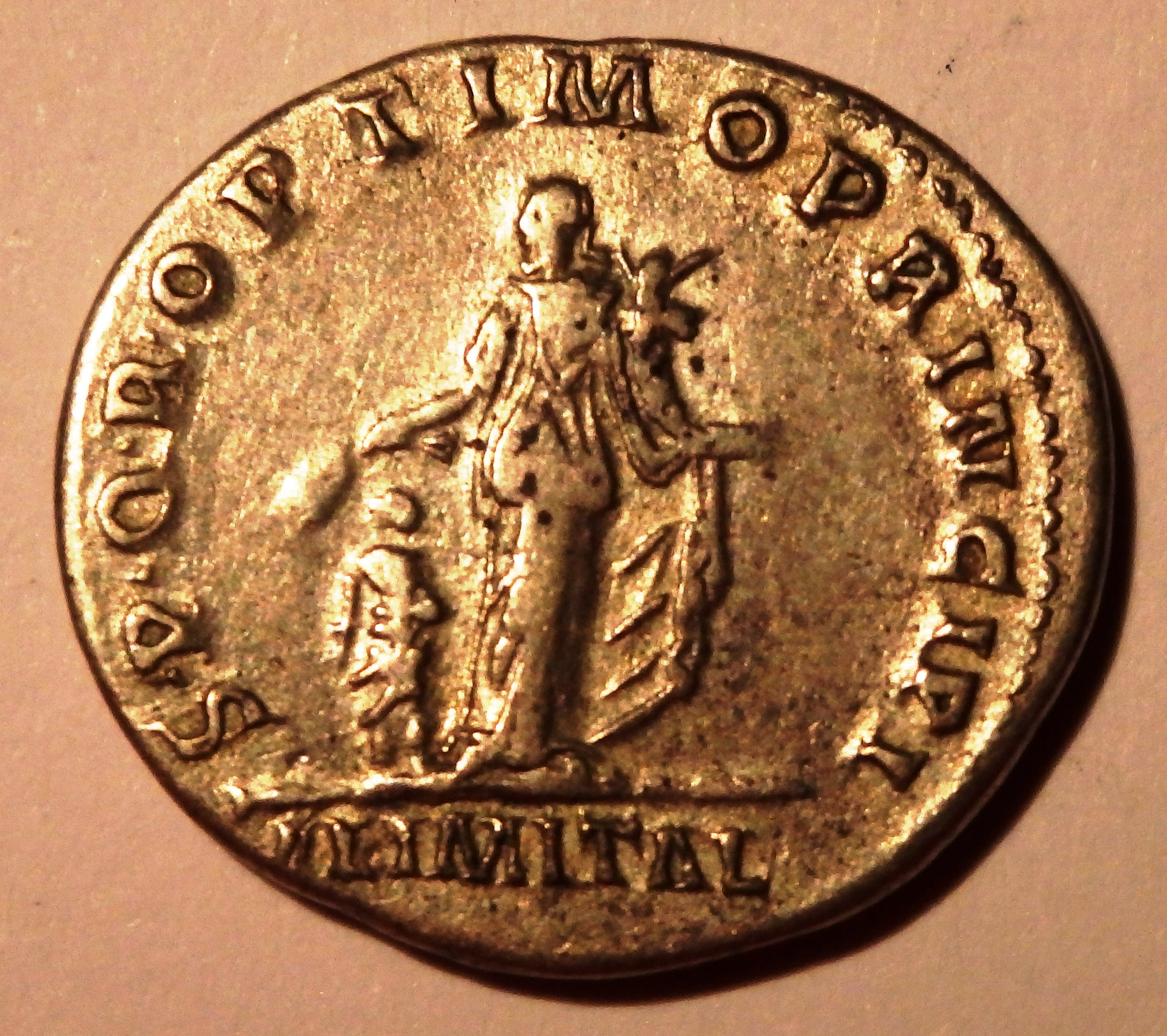 Denar z.Zt. Trajans mit ALIM(enta) ITAL(ia),(staatl. Unterstützung kinderreicher Familien), Kampmann 27.59.1